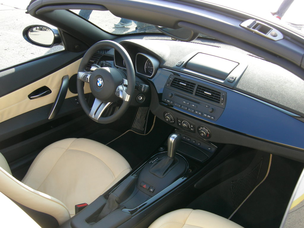 Wnętrze BMW Z4